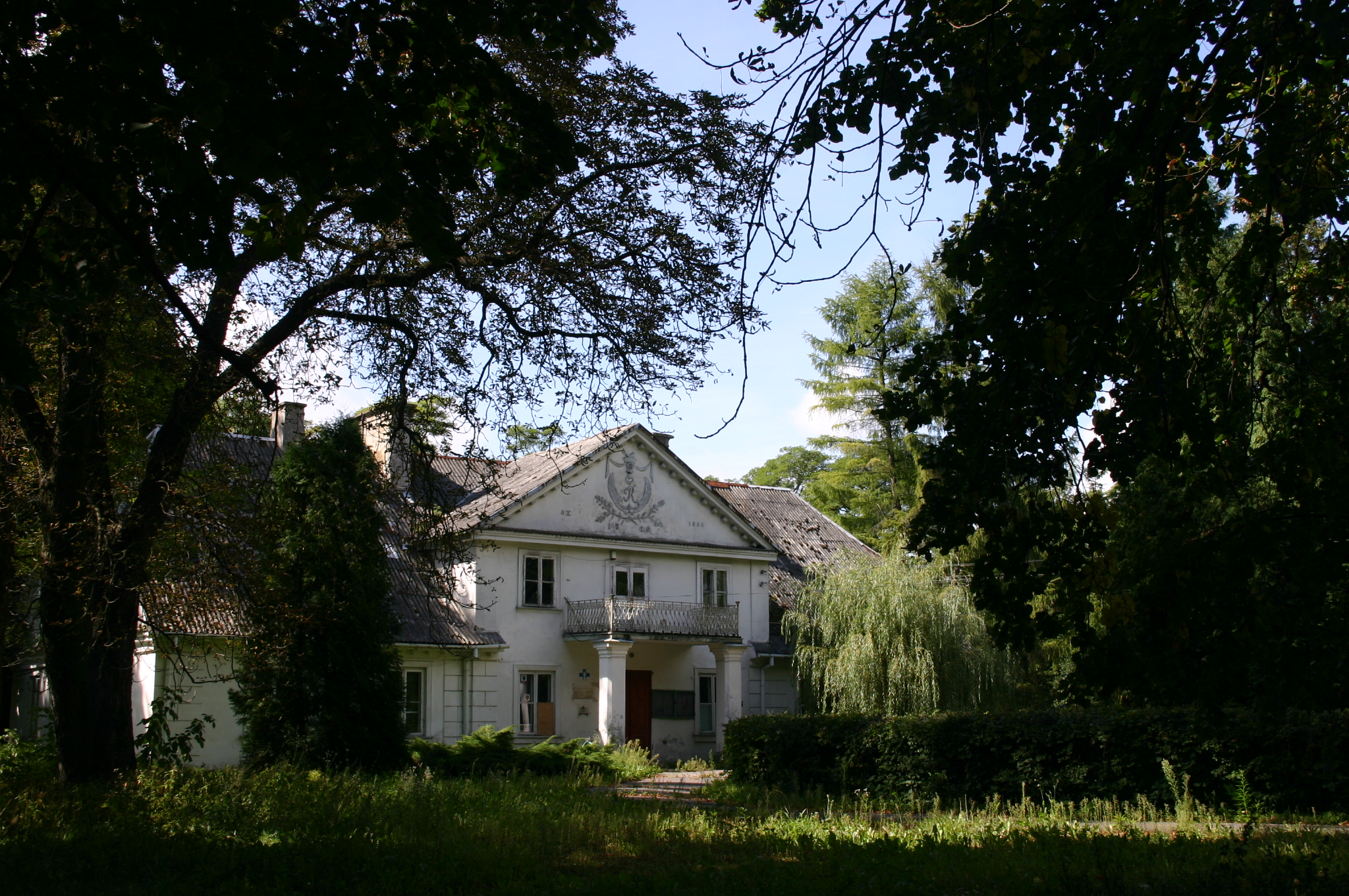 zespół dworski, pocz. XIX: dwór i park Prażmów, Gmina Prażmów